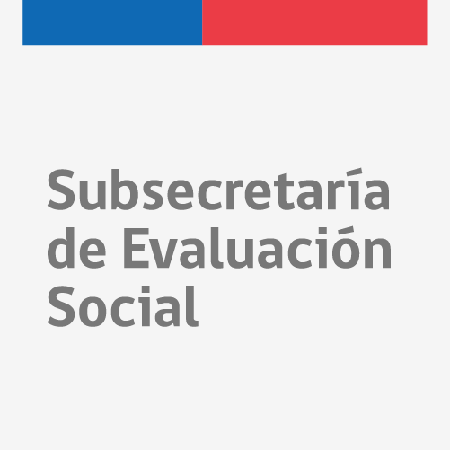 Logotipo de la Subsecretaría de Evaluación Social de Chile